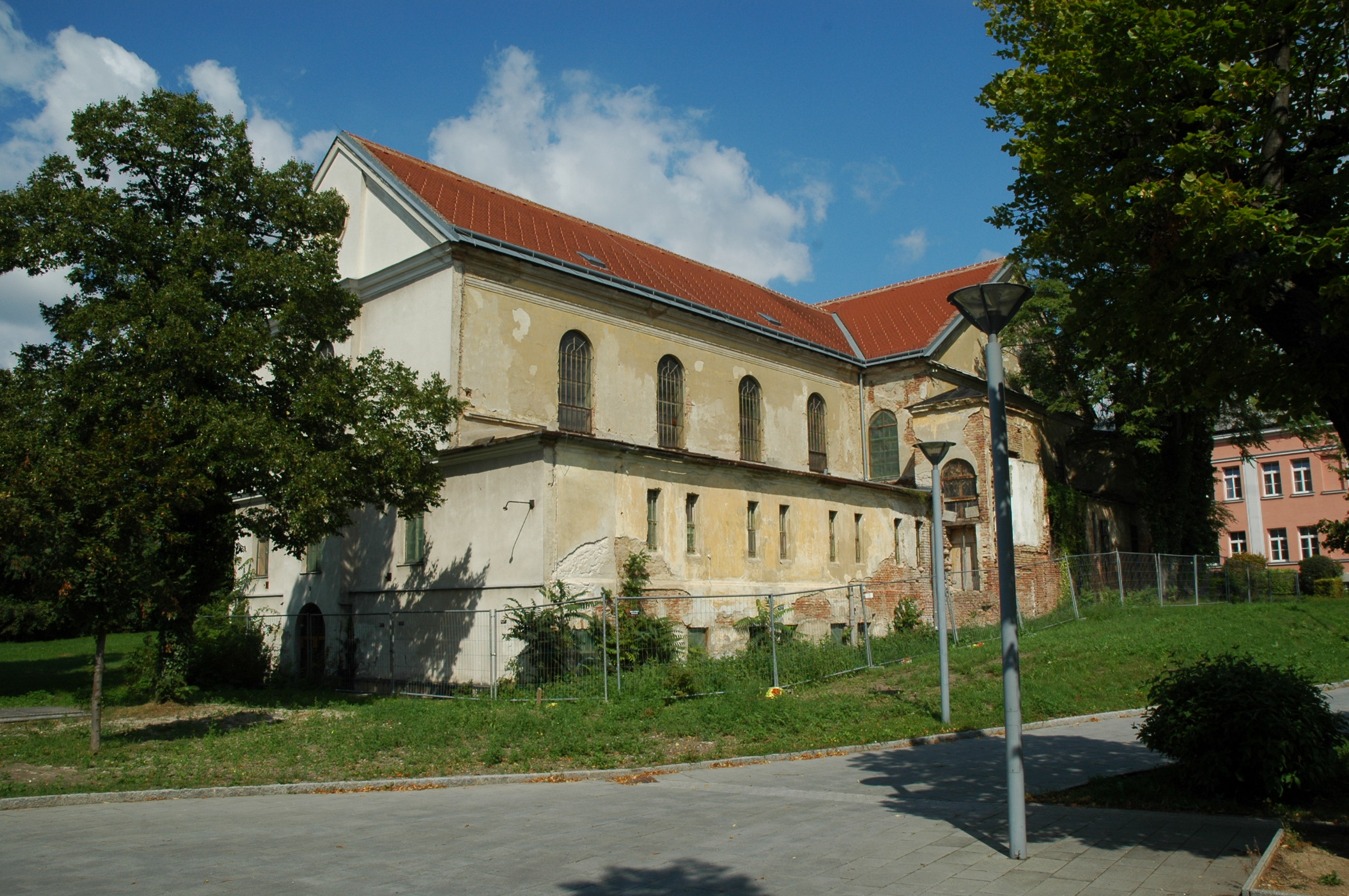 Aufnahme der Anstaltskirche der k.k. Weiberstrafanstalt von Wiener Neudorf. Das Dach wurde Anfang des 21.Jhts bereits erneuert. Eine Generalsanierung des Gebäudes ist geplant.